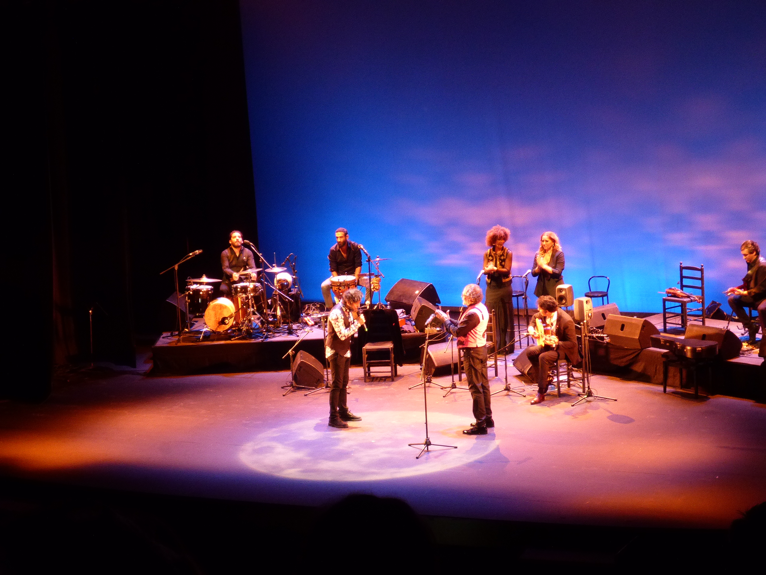 Diego Carrasco, concierto gira "No marrecojo", en el teatro Villamarta de Jerez de la Frontera (España) con Arcángel